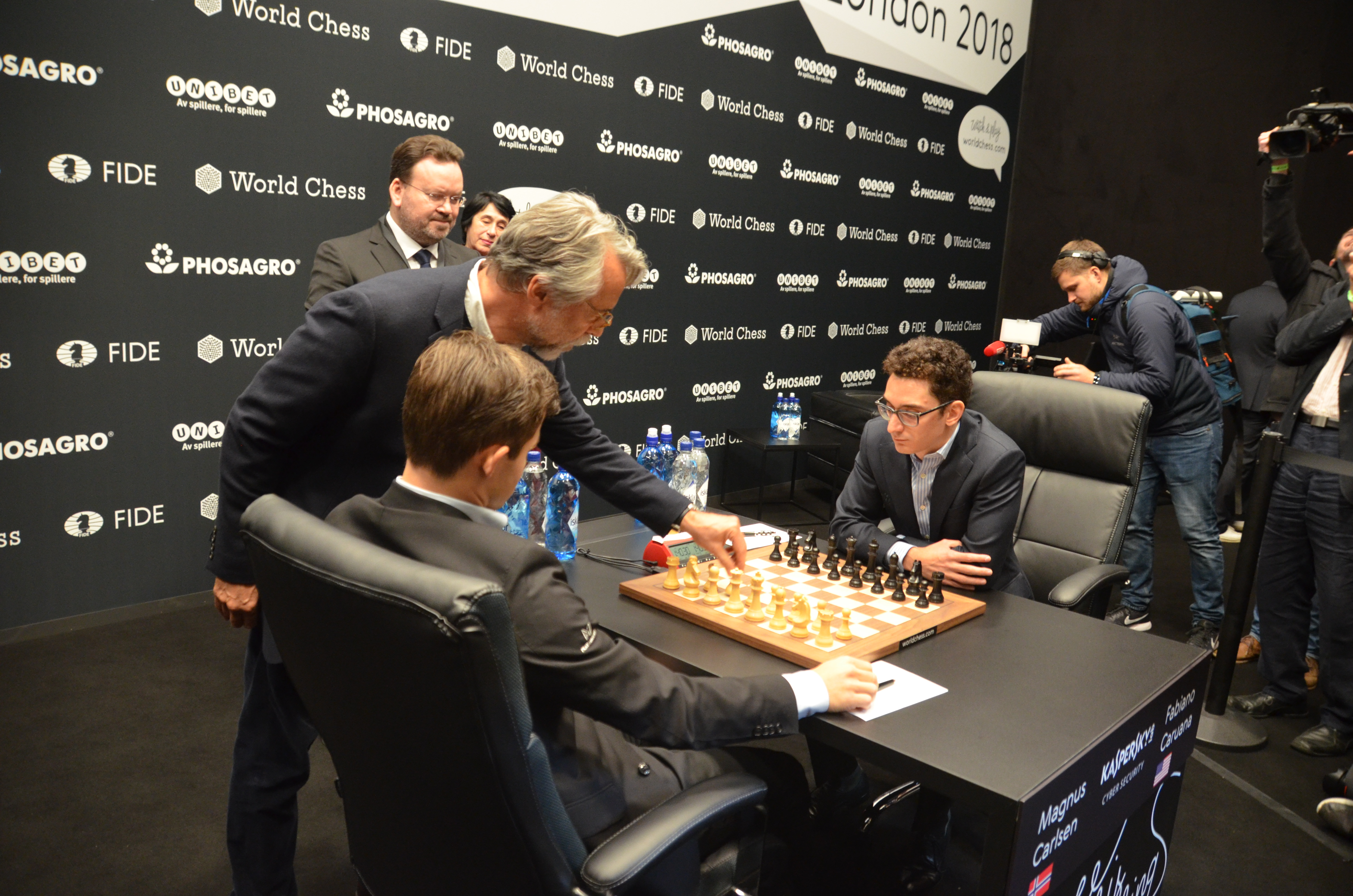 Daniel Weil, el diseñador de las piezas de ajedrez con las que se disputó el match por el Campeonato del Mundo de Ajedrez 2018, realizando el saque de honor (1.c4) en la novena partida del match Carlsen y Caruana.